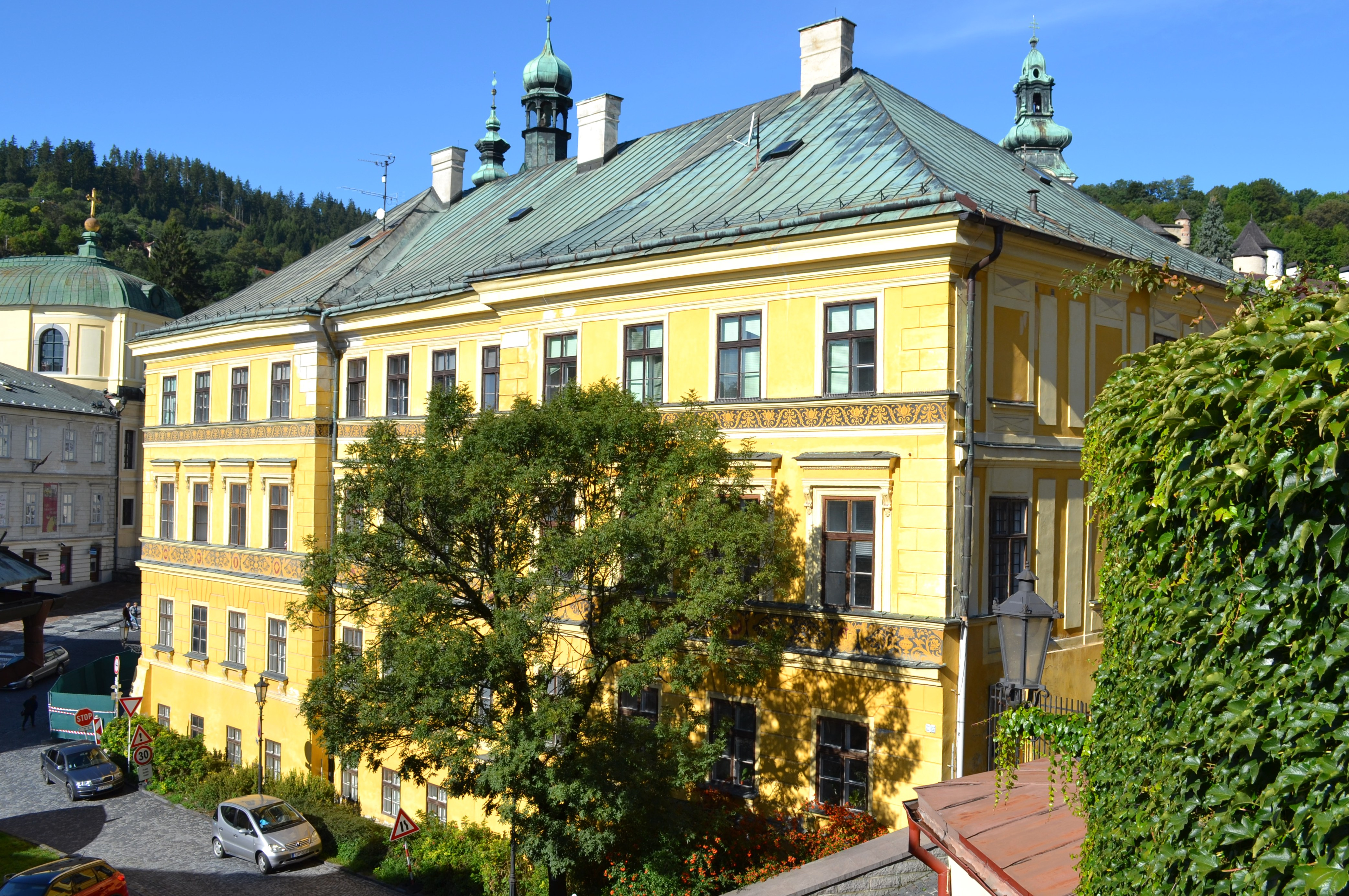 Pamätná budova na Radničnom námestí 16 v Banskej Štiavnici